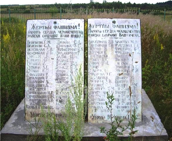 Старый памятник евреям деревни Славное Толочинского района, убитым нацистами 15 марта 1942 года.